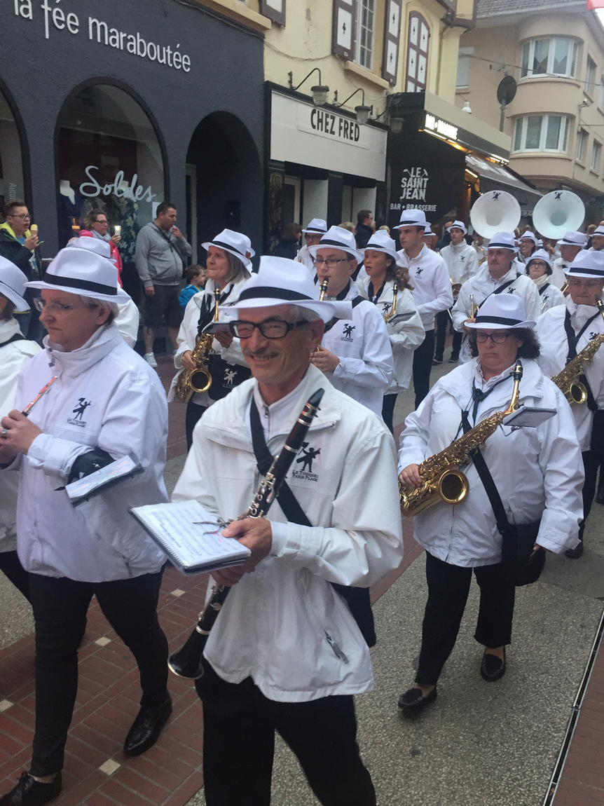 Harmonie municipale Le Touquet-Paris-Plage